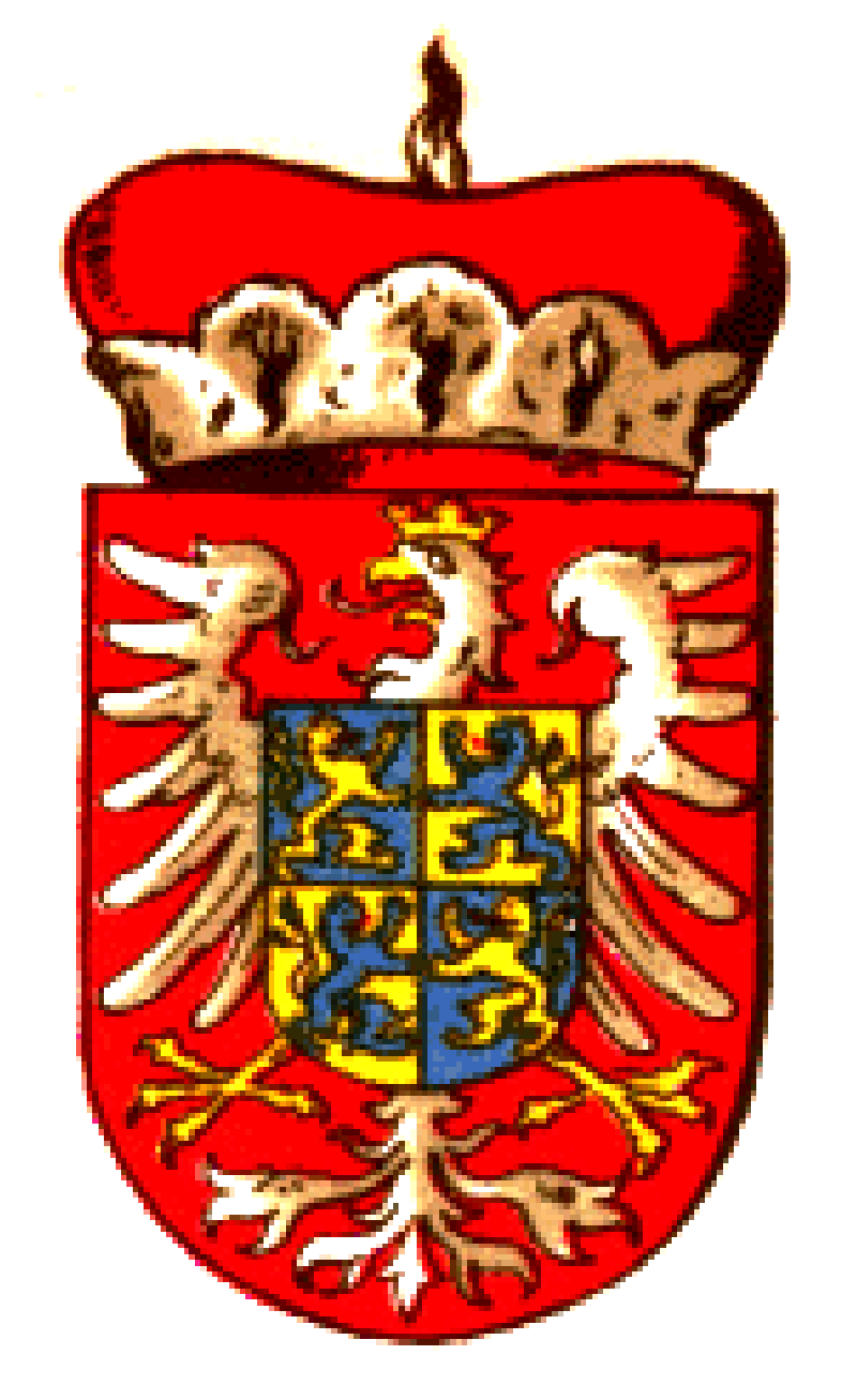 Wappen der Waldstein-Friedland